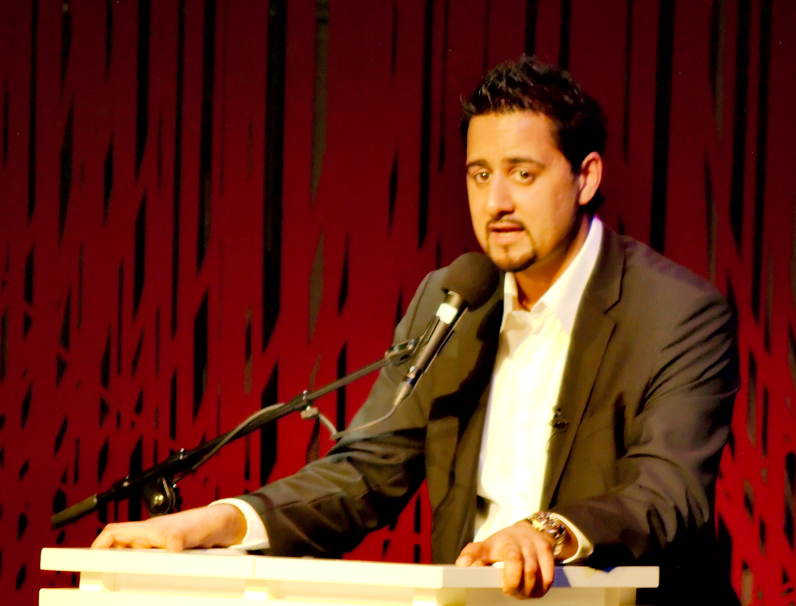 Dialogmøte om hat på Litteraturhuset i Oslo. Abid Q. Raja.